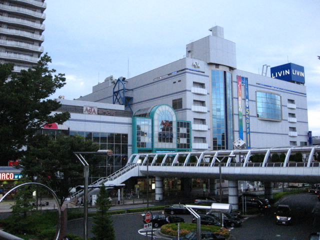 西武新宿線田無駅北口『アスタ専門店街/リヴィン田無店』